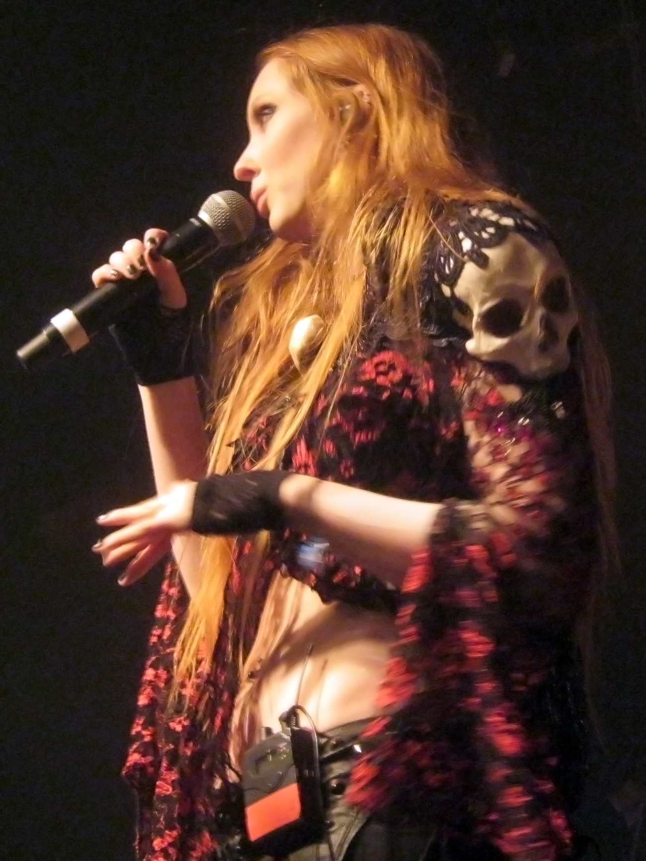 Infy Snow, live gig 14/01/2016